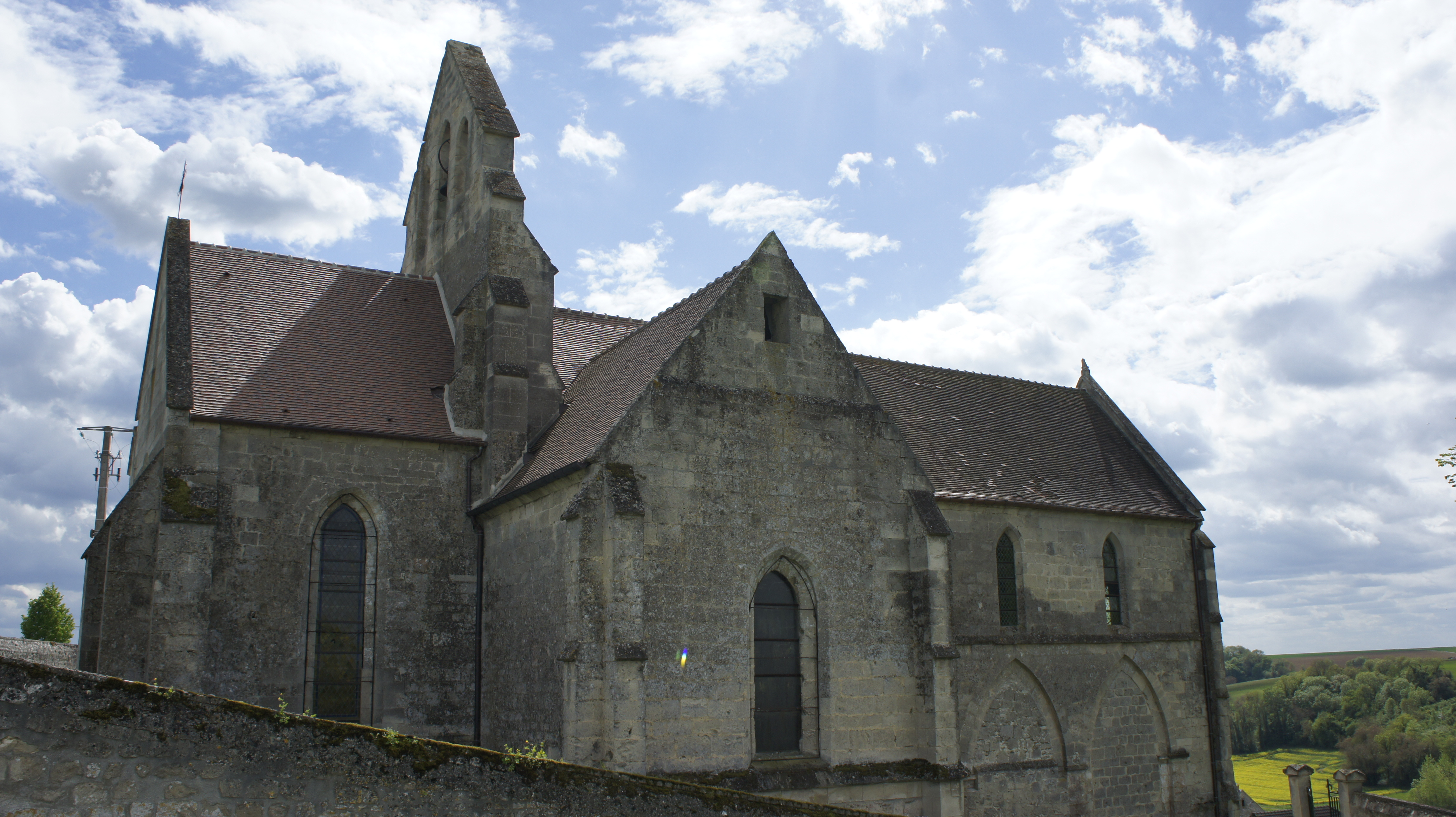 porche sur le côté nord .